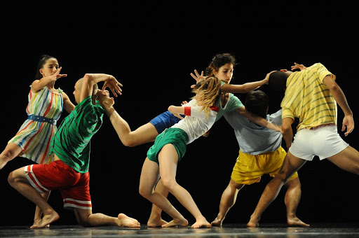 Renana Raz, The Diplomats 2011 by Gadi Dagon